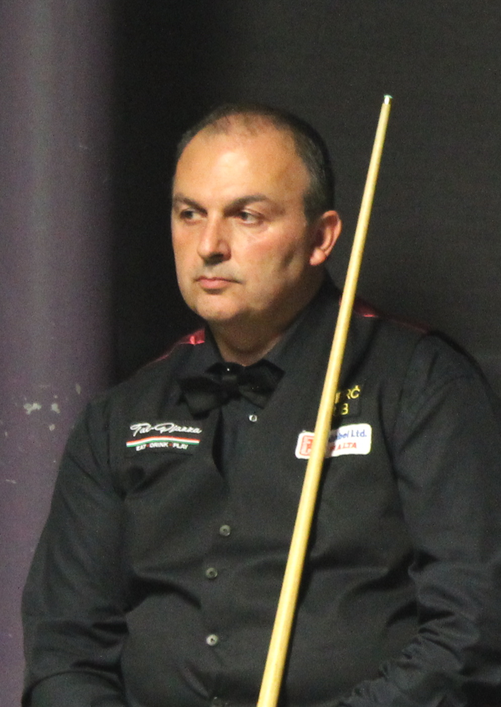 Alex Borg beim Paul Hunter Classic 2016